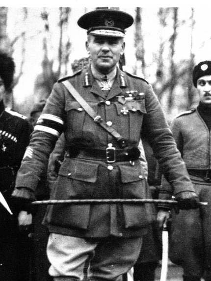 El general británico Frederick C. Poole, al mando de las tropas Aliadas en Arjángelsk hasta octubre de 1918, junto a unos cosacos. Más tarde destinado con el Ejército Blanco en el sur de Rusia.